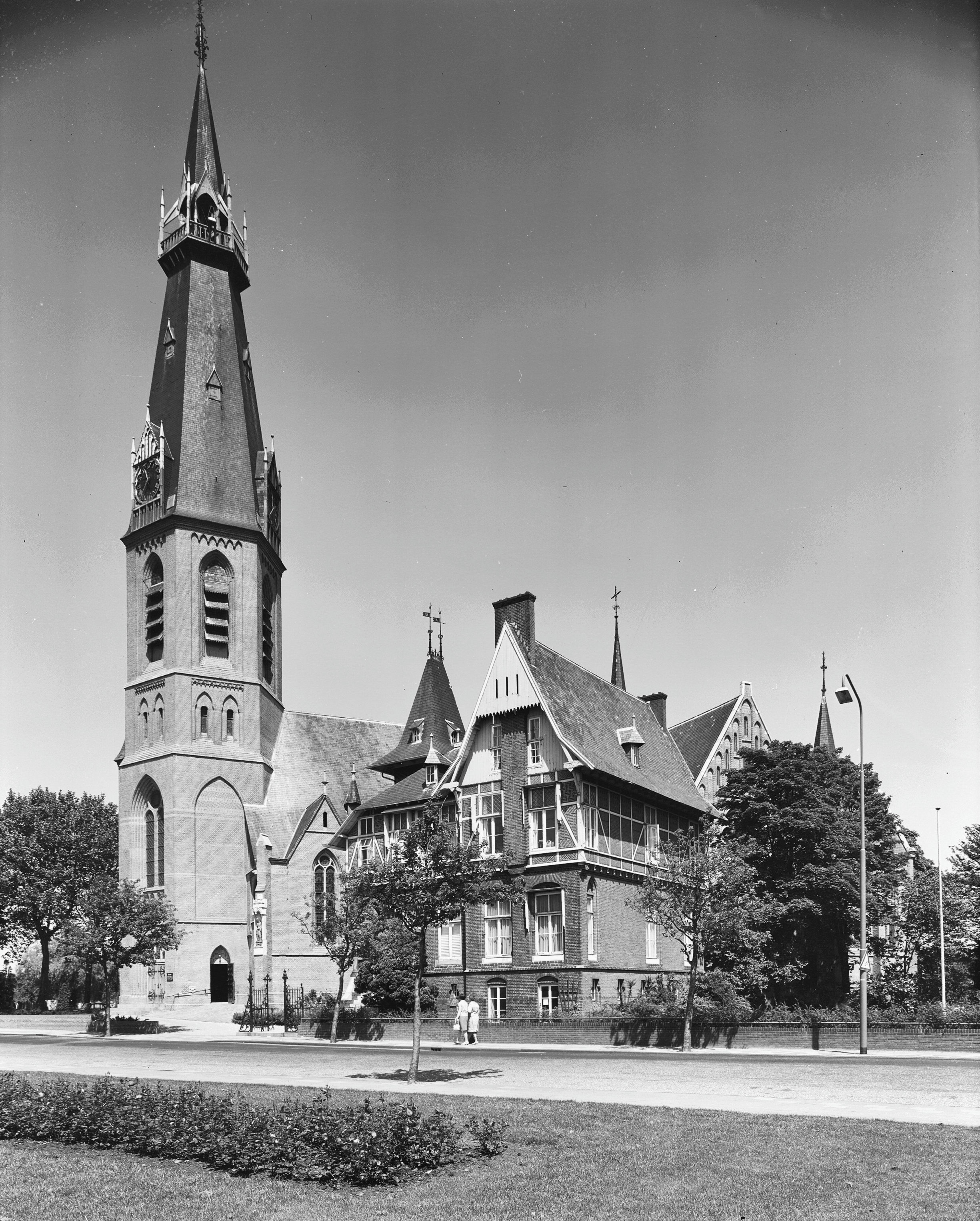 R.K.St.Urbanuskerk: exterieur